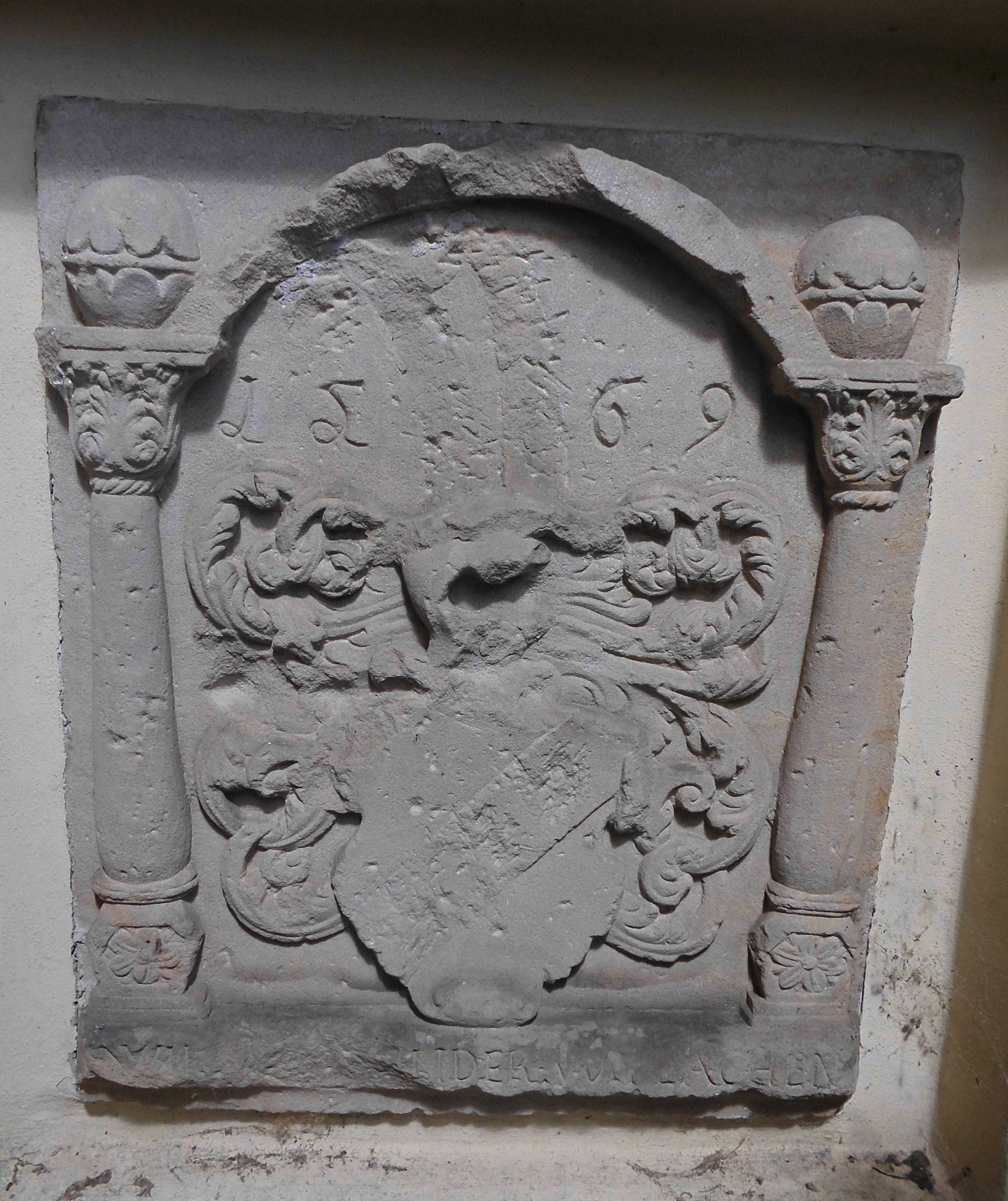 Wappen des Wilhelm Schliederer von Lachen, eingelassen in eine Mauer des Ketschauer Hofs in Deidesheim